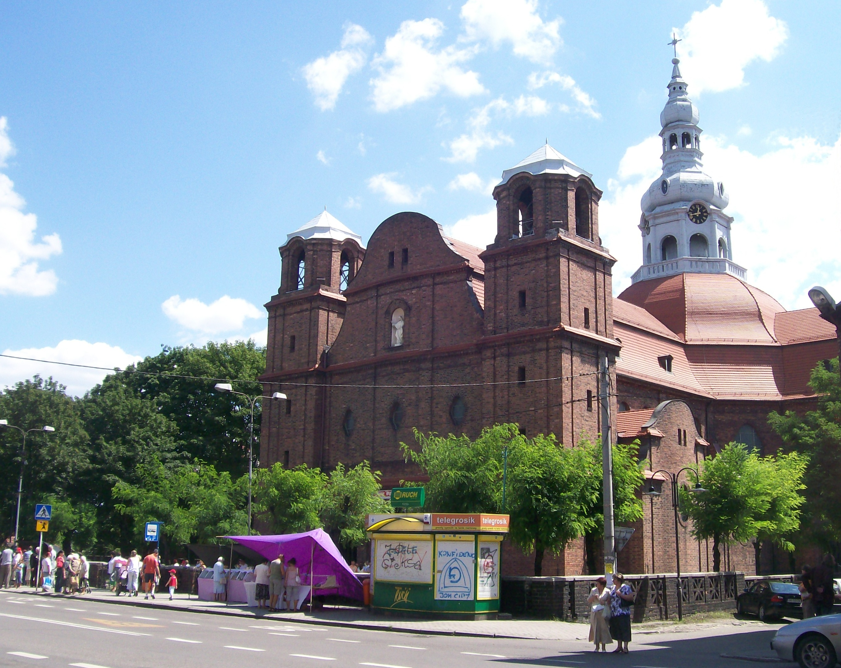 Kościół św. Anny w Janowie. Janów-Nikiszowiec 27.07.2008.